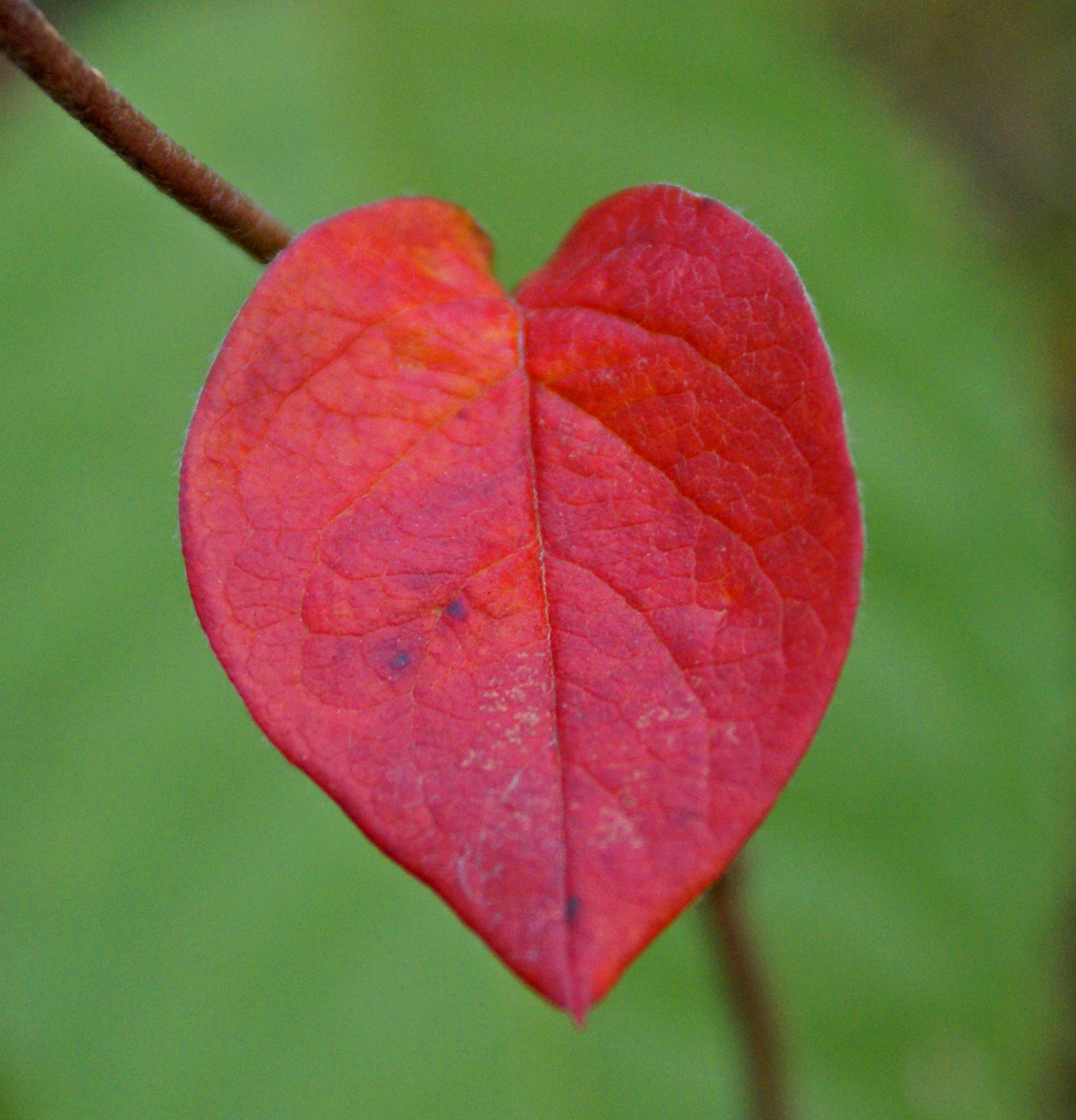 Hjertelig hilsen...